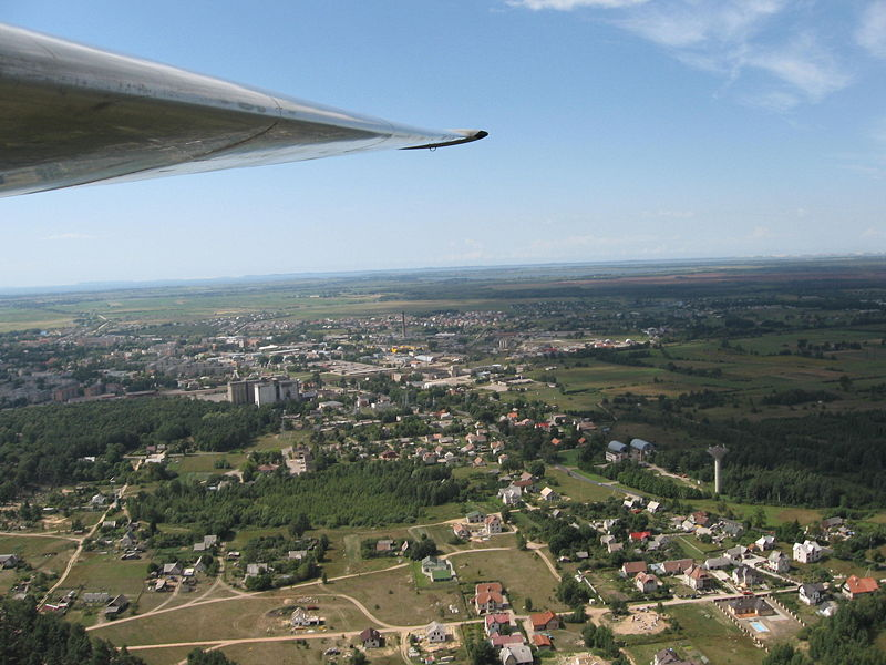 Barzdūnai